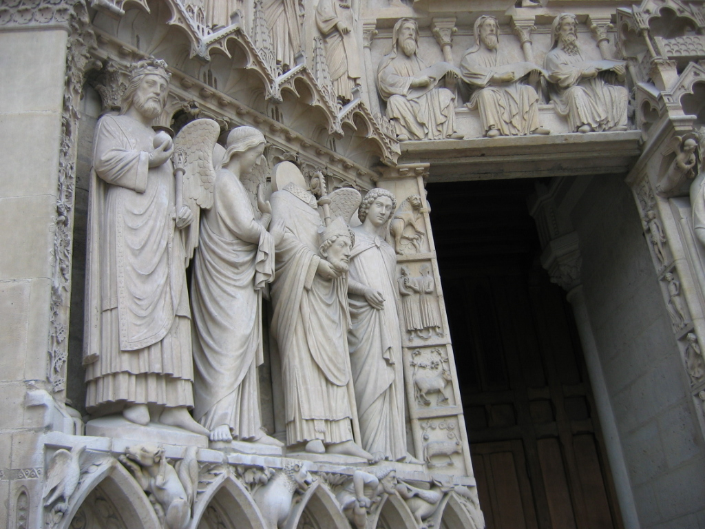 Cathédrale Notre-Dame de Paris: portail de gauche